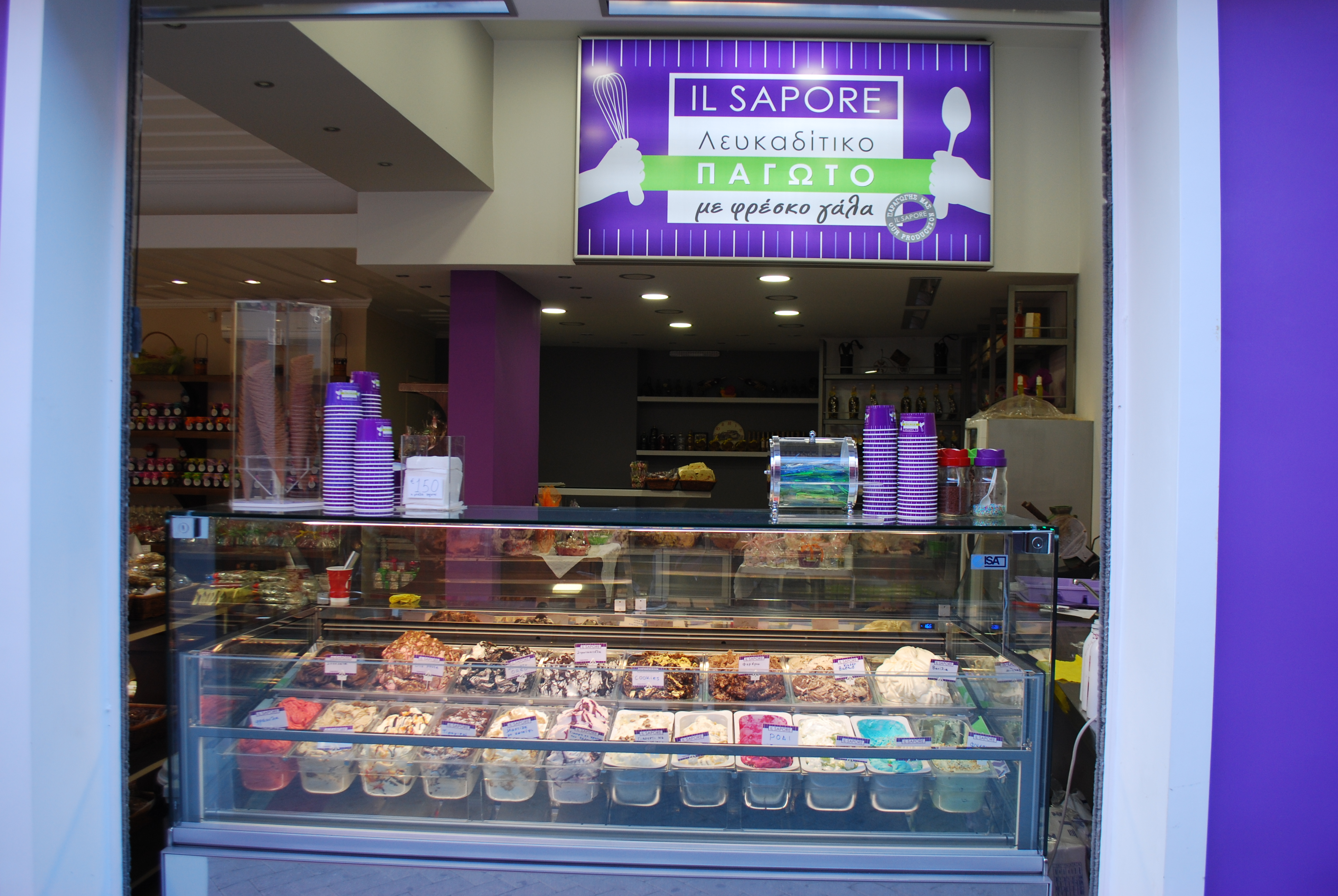 Vue de Lefkada.